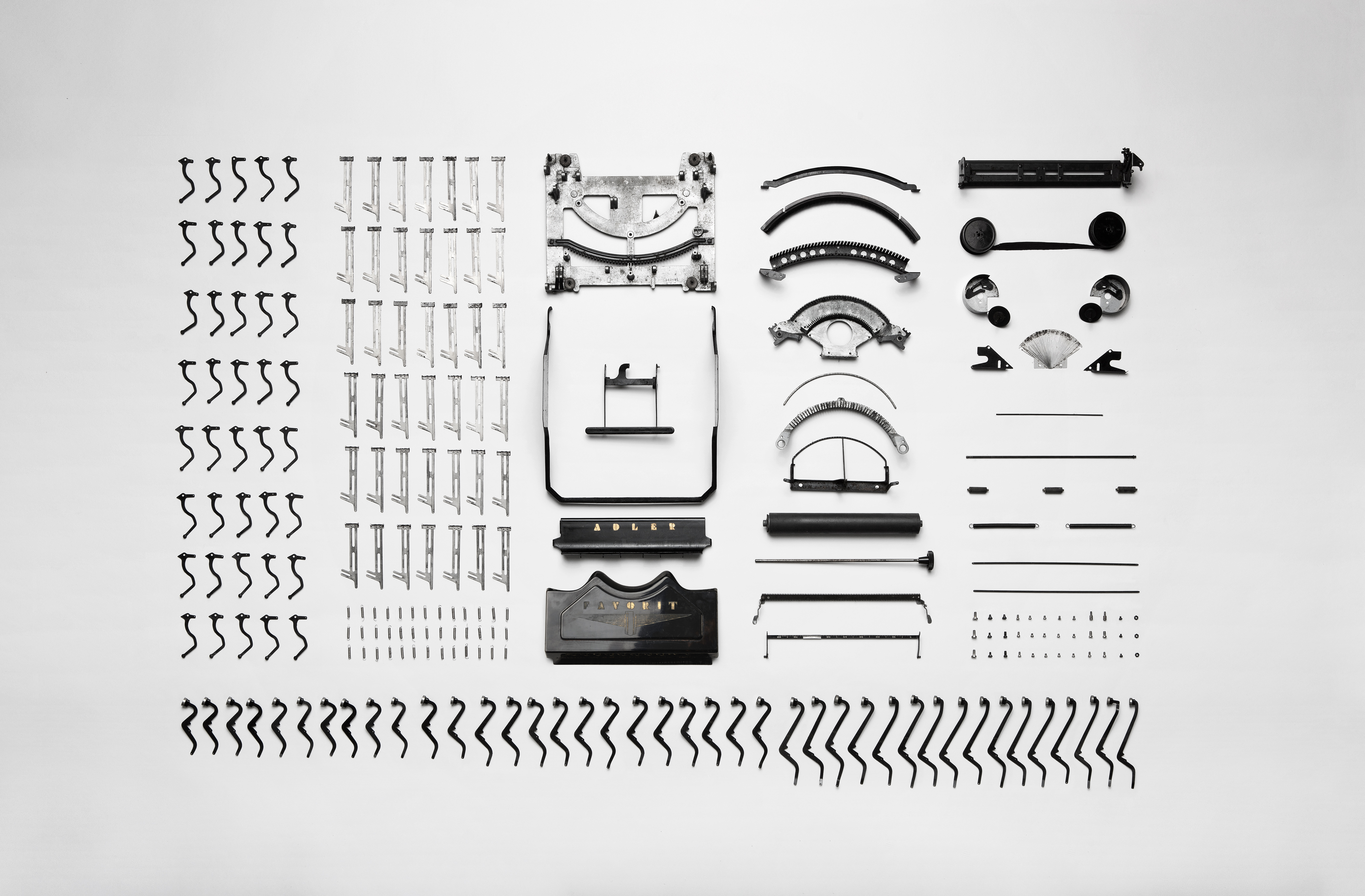 Zorge dismetitaj eroj de malmuntita mekanika tajpmaŝino Adler Favorit.